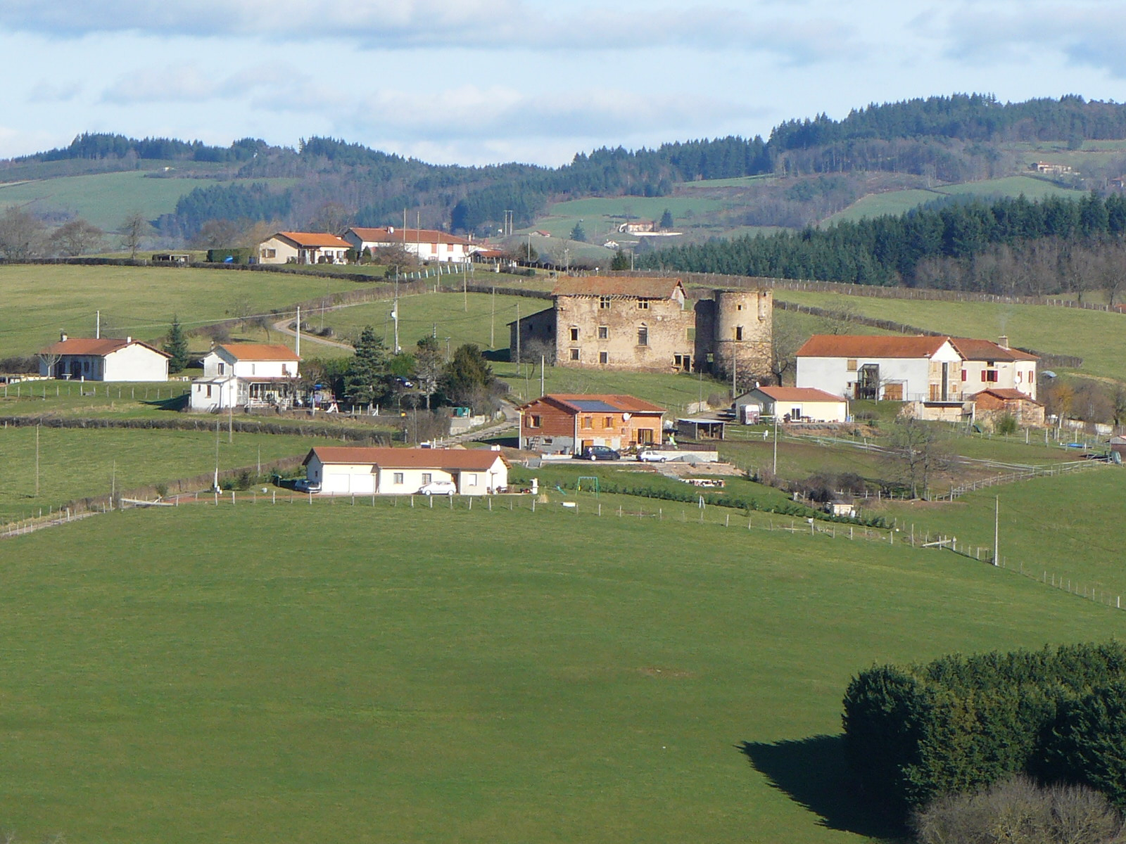 Lieu-dit historique de notre village.